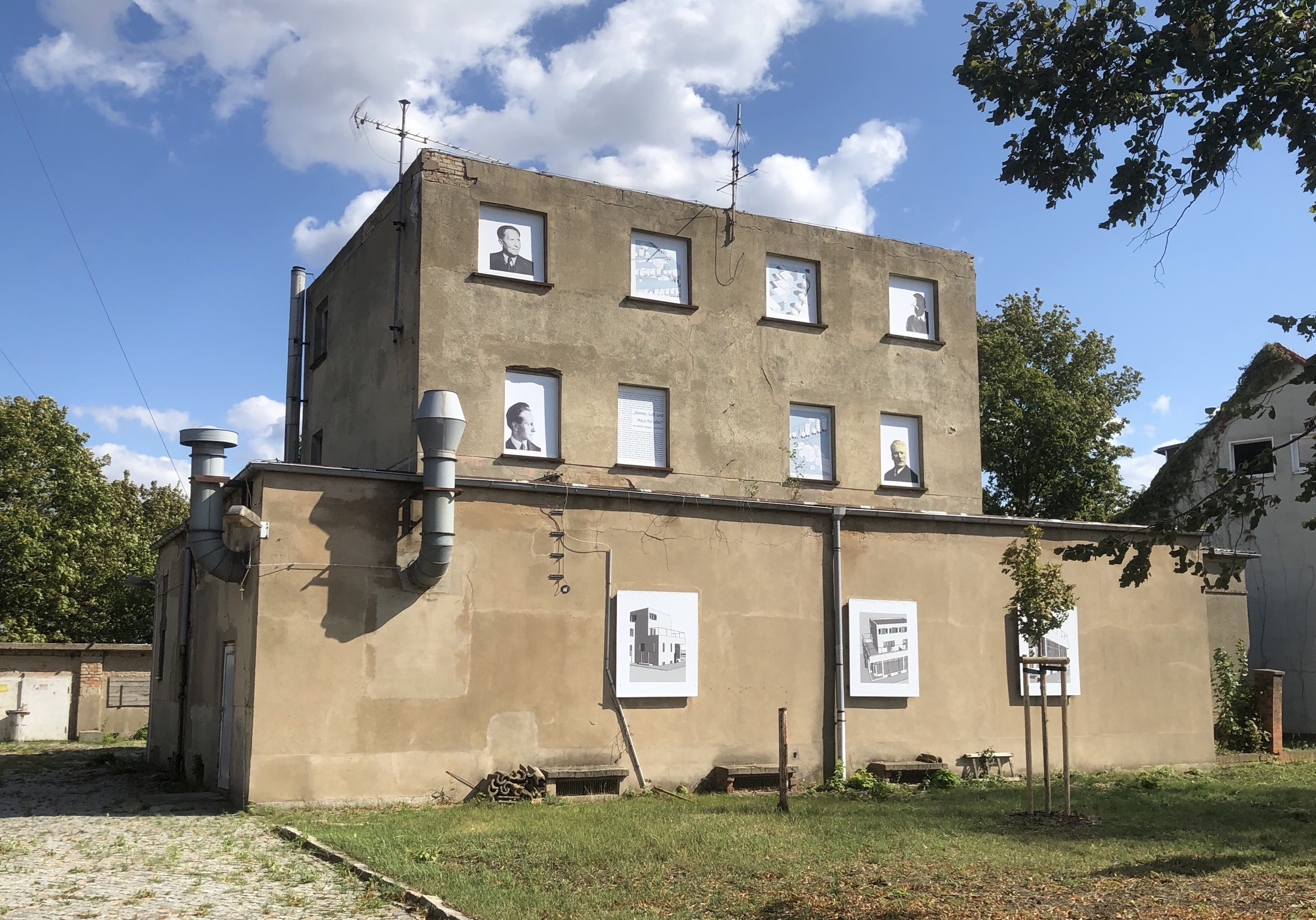 Zickzackhausen in Bernburg